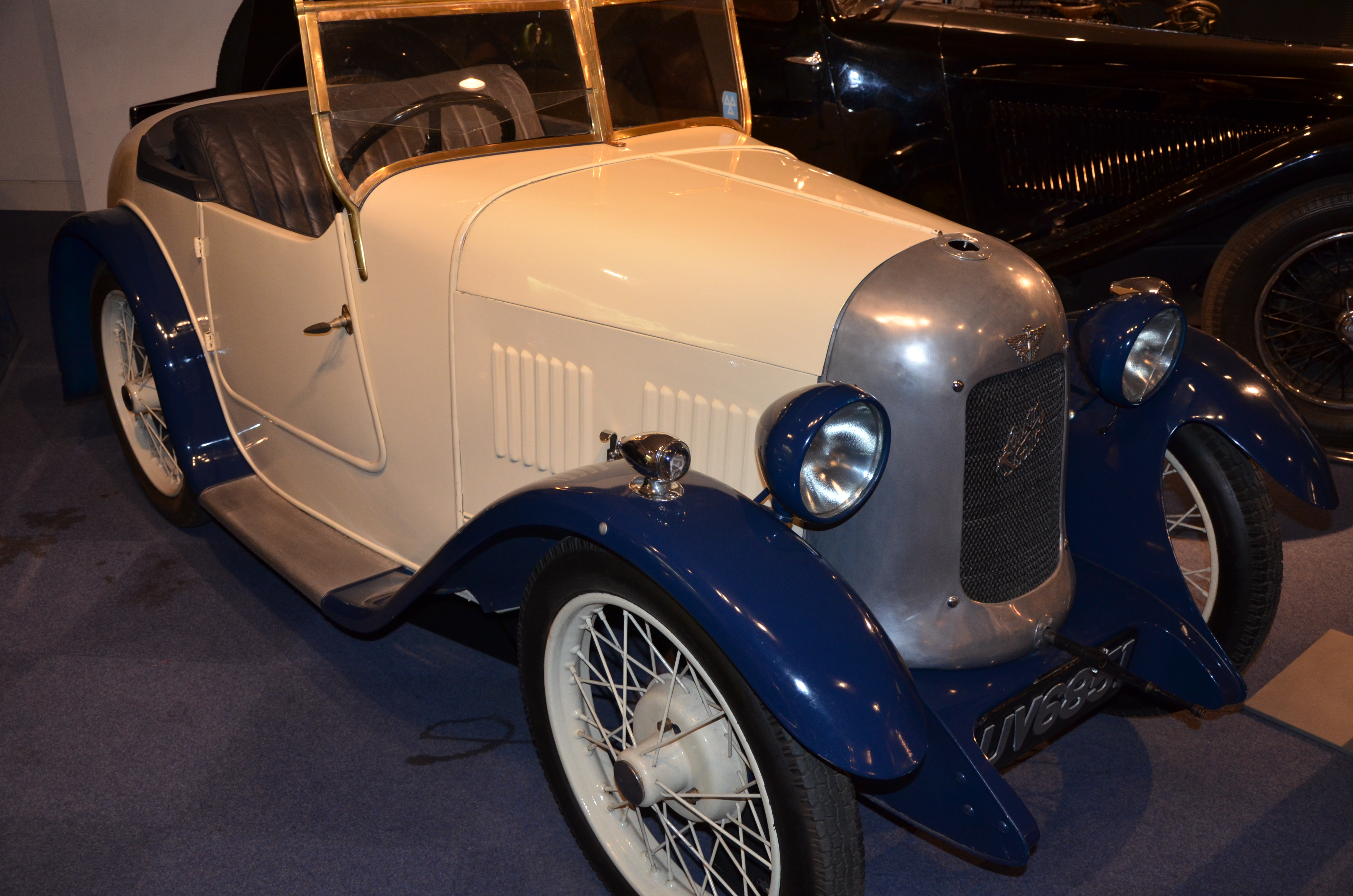 Built in 1929.